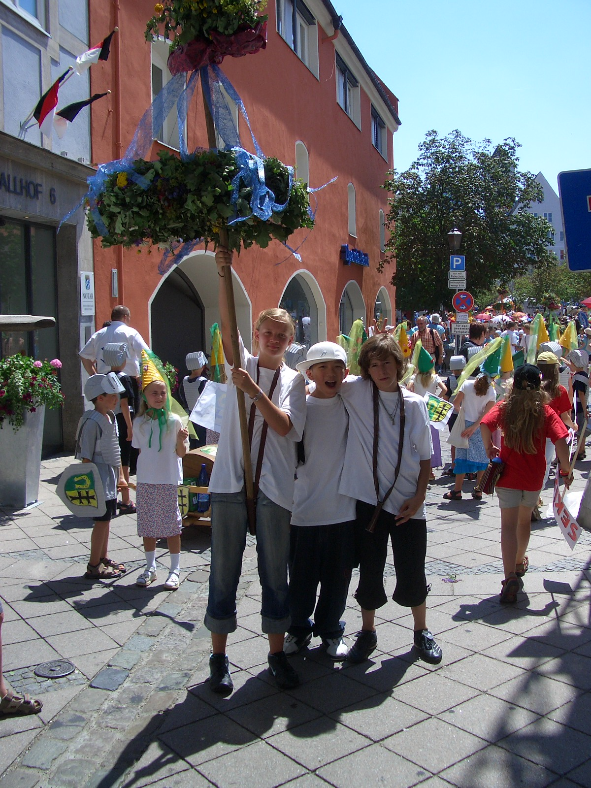 Das Memminger Kinderfest, Kinder mit dem traditionellen Kinderfestsymbol - dem Stängele